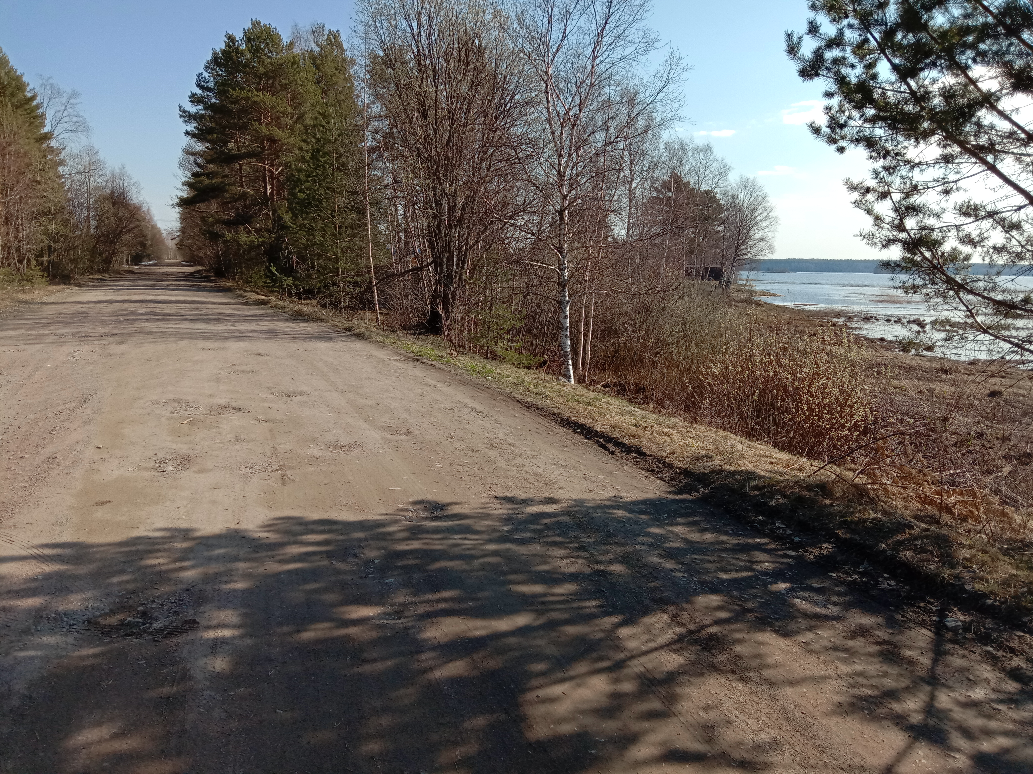 Ала-Ууксу